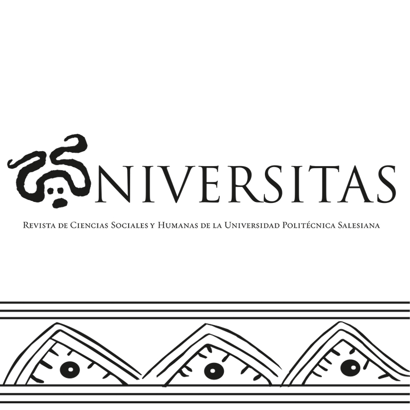 Portada de la revista Universitas